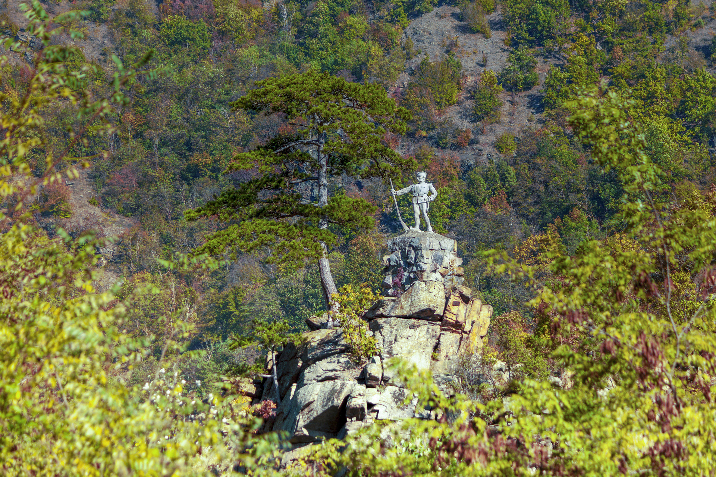 Споменик Српским јунацима над Ибром Ово је фотографија заштићеног природног добра у Србији под шифром: СП181 This is a a photo of a natural area in Serbia with ID: СП181